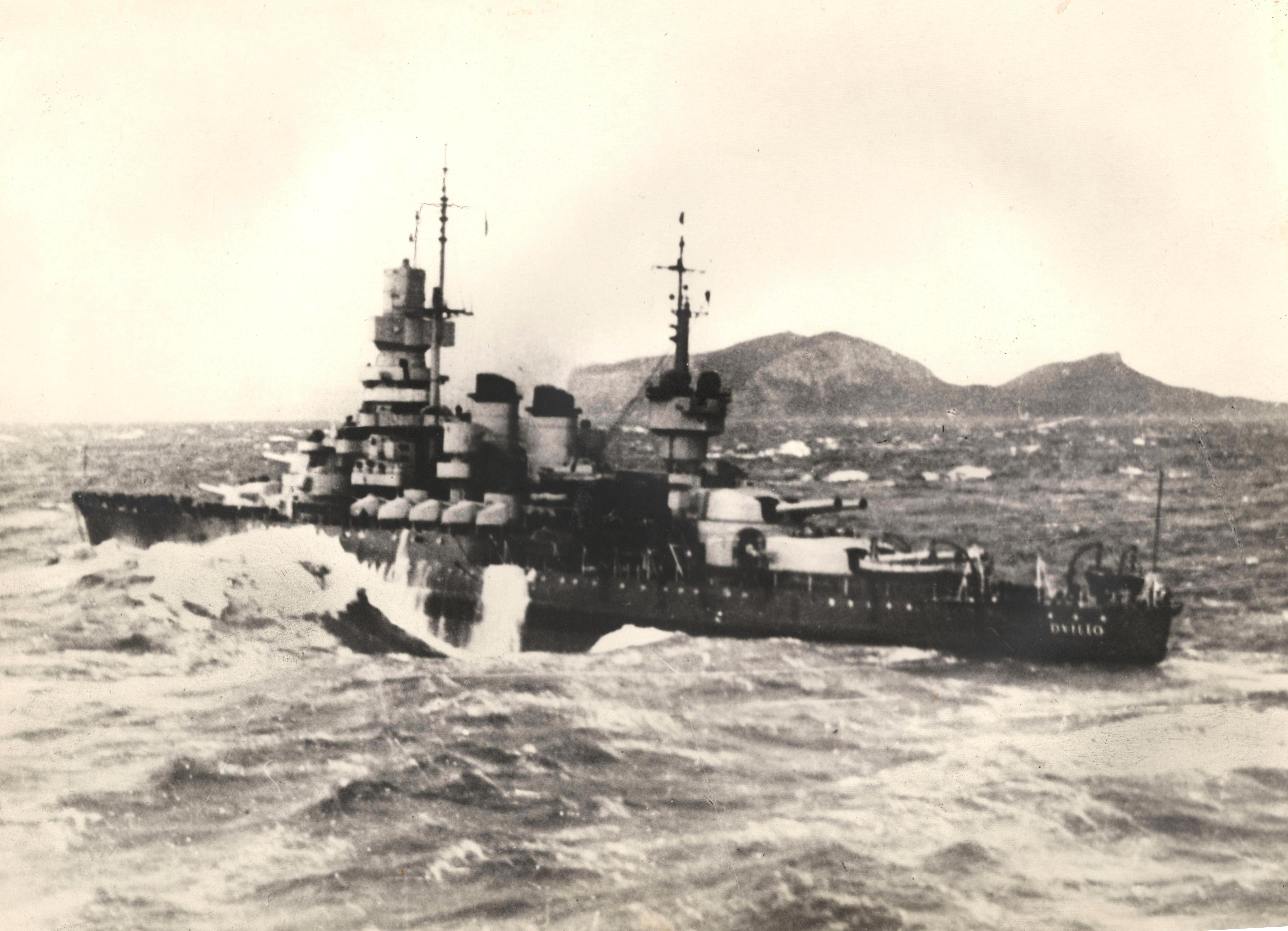 Regia Nave da Battaglia Corazzata Caio Duilio